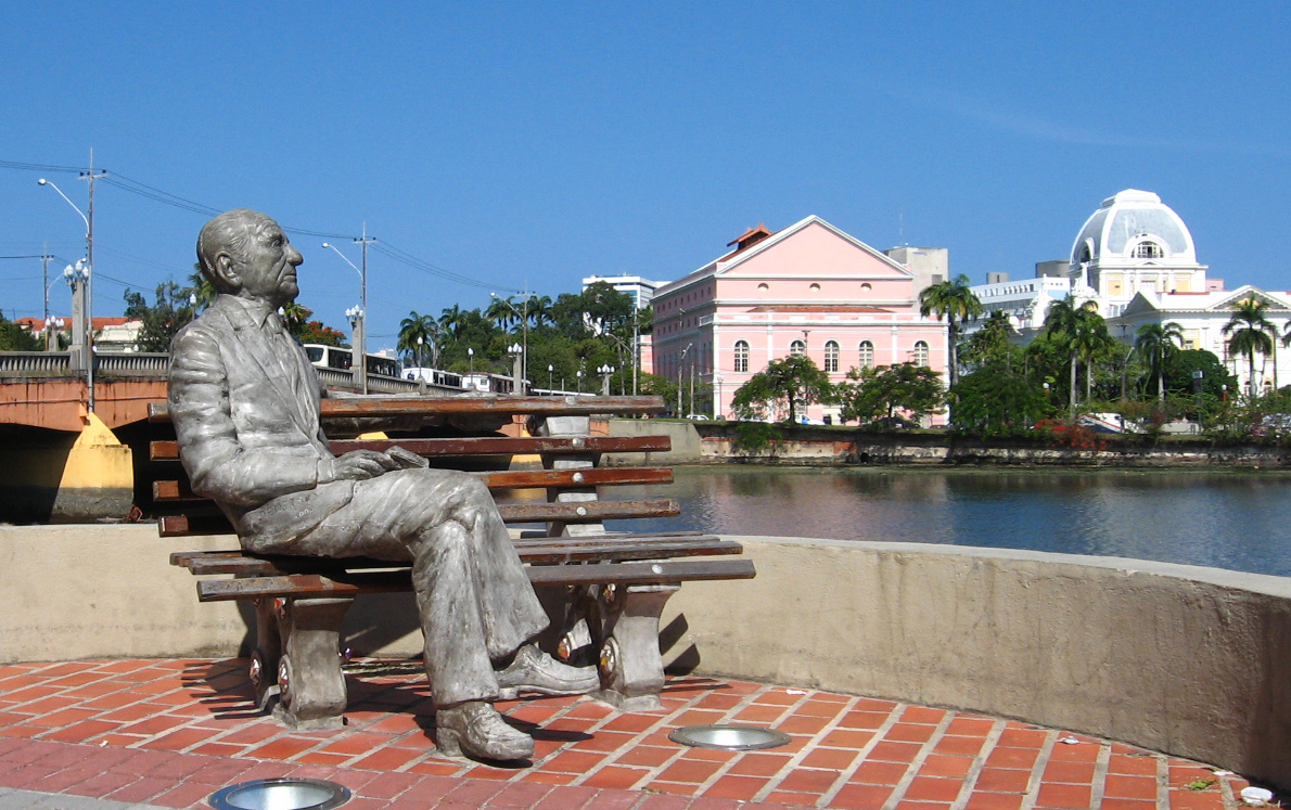 Statue of João Cabral de Melo Neto, Brazilian poet, in Recife, Brazil.